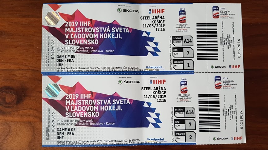 Lístky na zápas Dánsko - Francúzsko, 11. máj 2019. Steel Aréna Košice, MS v ľadovom hokeji 2019